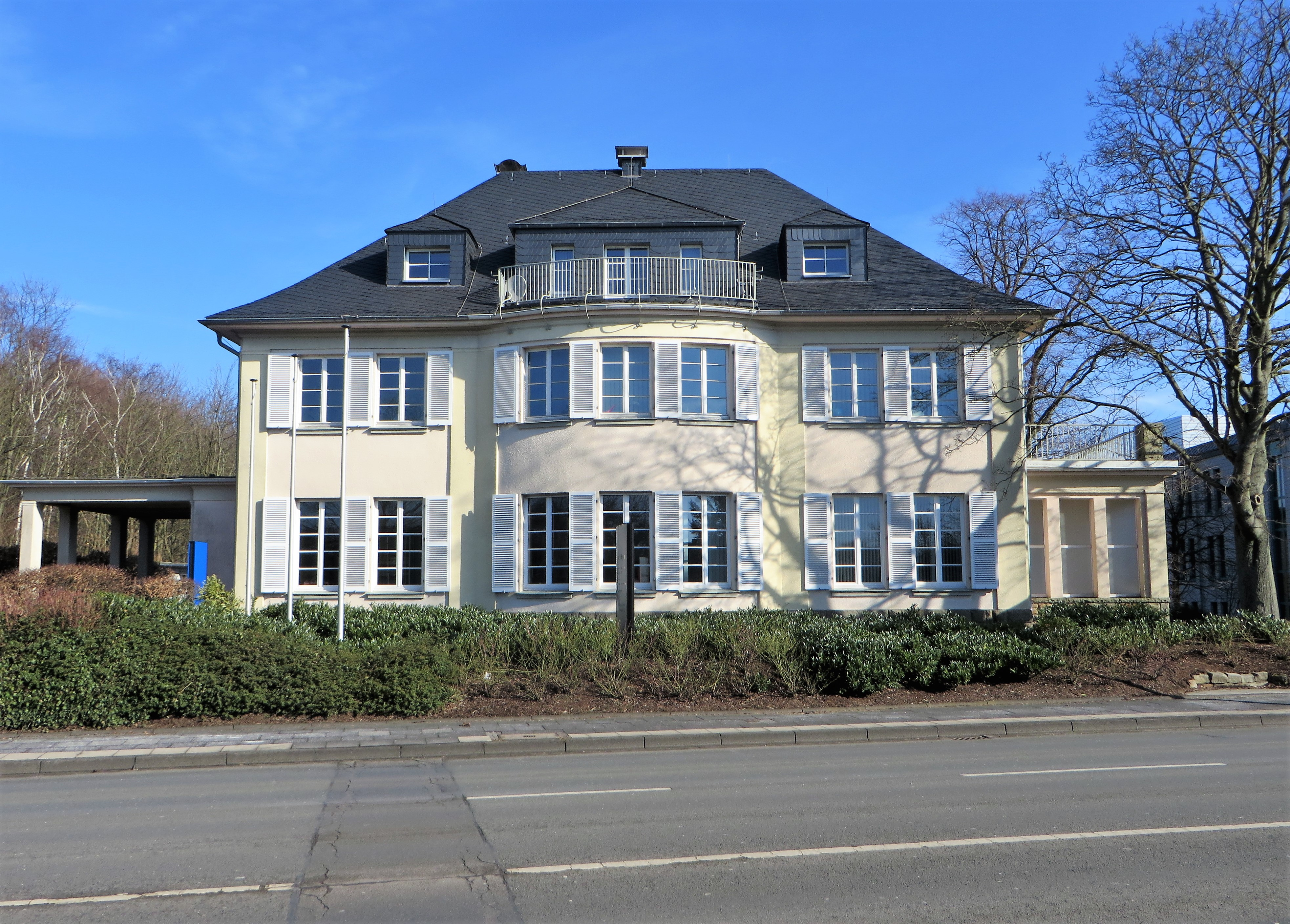 FernUniversität Hagen „Villa Bechem“, Feithstraße 152. Institut für Geschichte und Biographie - Archiv „Deutsches Gedächnis“ - Dimitris-Tsatsos-Institut für Europäische Verfassungswissenschaften - Institut für Japanisches Recht.